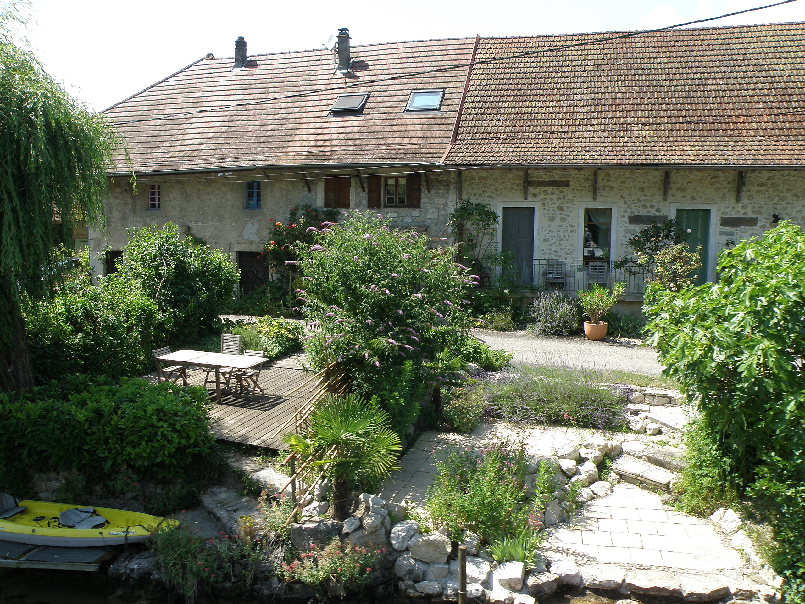 Vions, comm. de la Savoie (région Rhône-Alpes, France). Hameau des Granges, au bord du canal de Savières et à la lisière de la Chautagne.